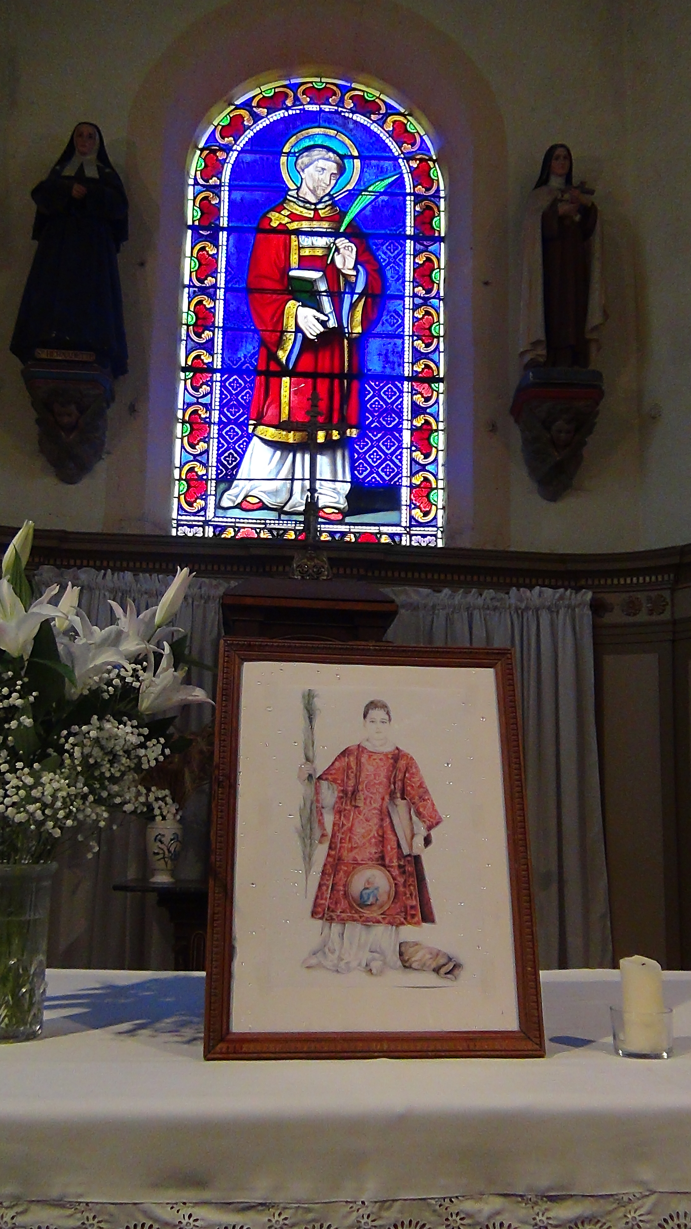 Vetrata di "St. Césaire diacre et martyr", Église Saint Césaire di Évaux-et-Ménil (Vosgi) Francia.